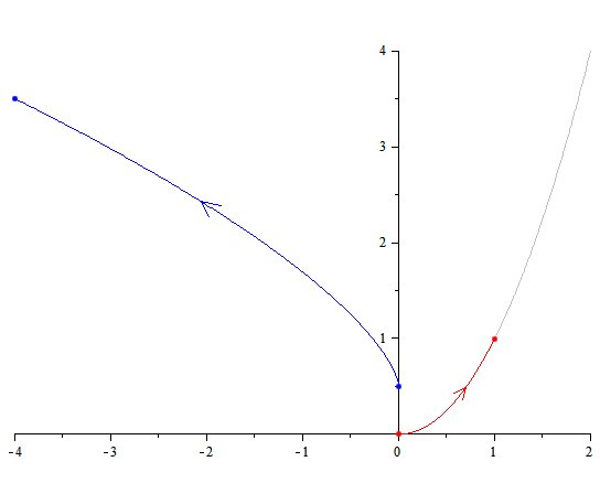 Een parabool (rood) en zijn evolute, de semikubische parabool (blauw). Van beiden wordt slechts een helft getekend om de figuur niet te overladen.